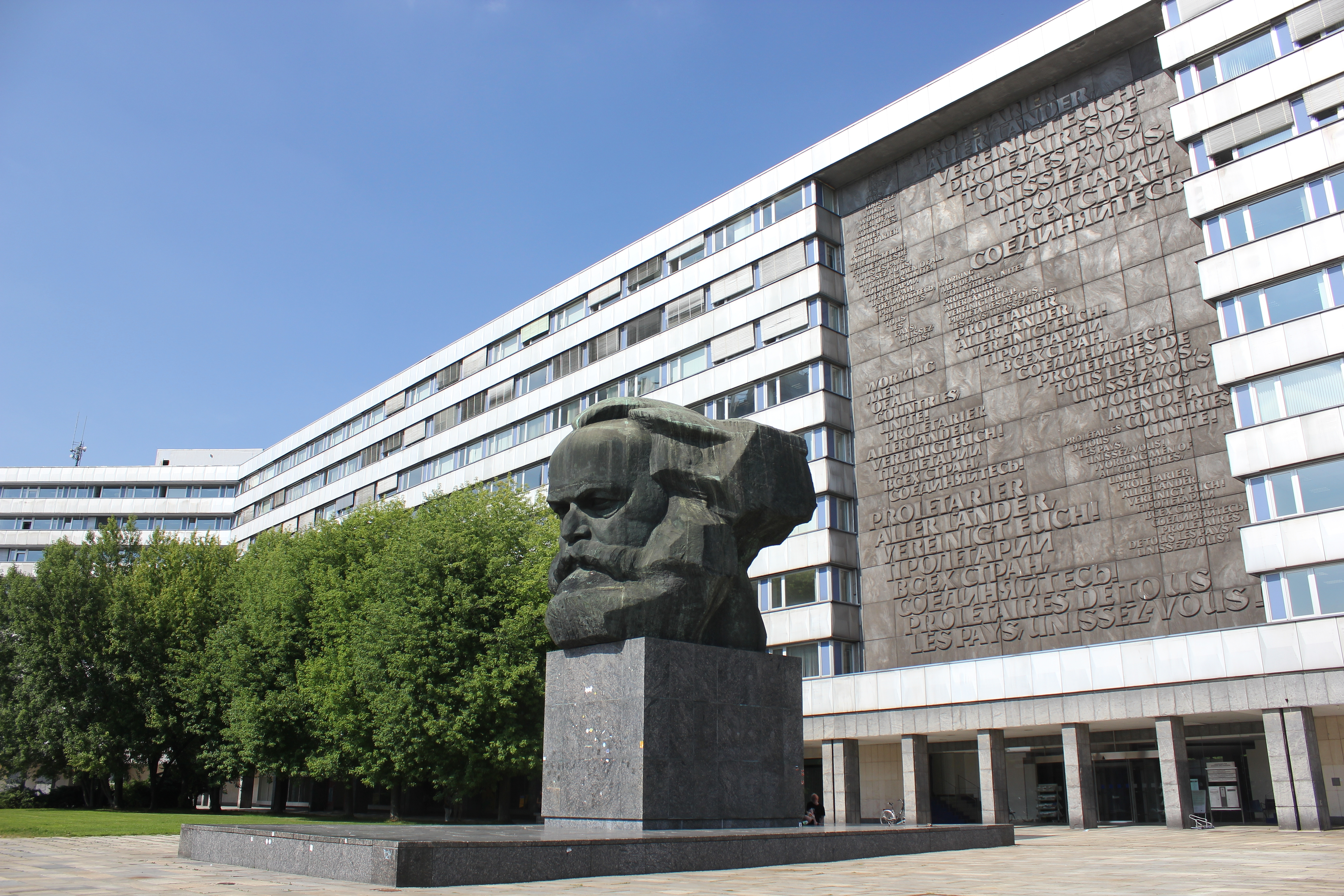 Das Monument wurde Monate vor der Errichtung in Karl-Marx-Stadt in der Kunstgießerei Monument Skulptura in Leningrad in Bronze gegossen und dann in 95 Einzelteile zerlegt. In Karl-Marx-Stadt sollten diese Einzelteile wieder zusammengeschweißt werden, doch die sowjetische Technik war nicht geeignet, so dass man sich entschloss, den Auftrag an den VEB Germania zu übertragen, da sonst ein Auseinanderreißen der zusammengeschweißten Teile zu befürchten war. Das Denkmal steht auf zwei Sockeln, die mit Korninskij-Granit, benannt nach der Abbauregion in der Südukraine, plattenartig überdeckt sind.